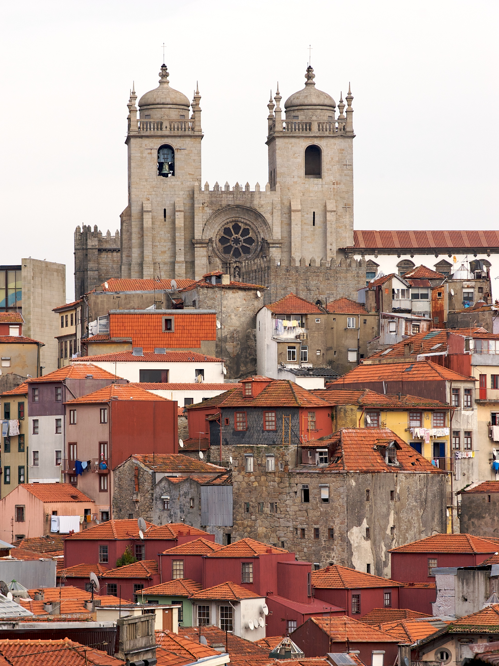 Porto, Portugal [2008]